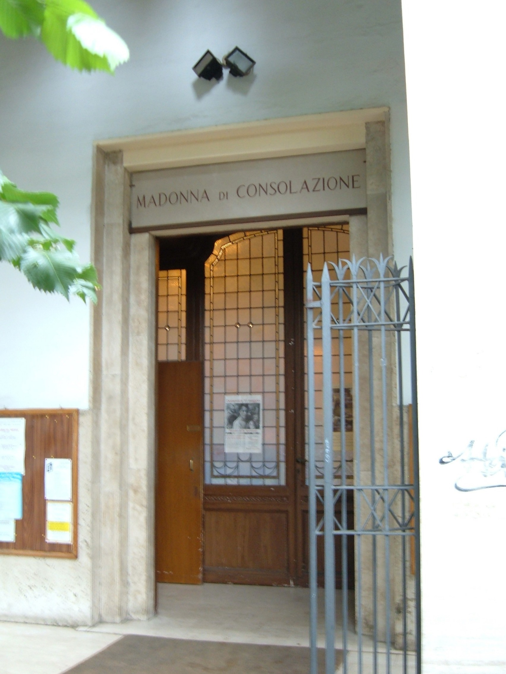 Chiesa di Santa Maria della Consolazione, a Roma, nel quartiere Gianicolense. Portale d'entrata.